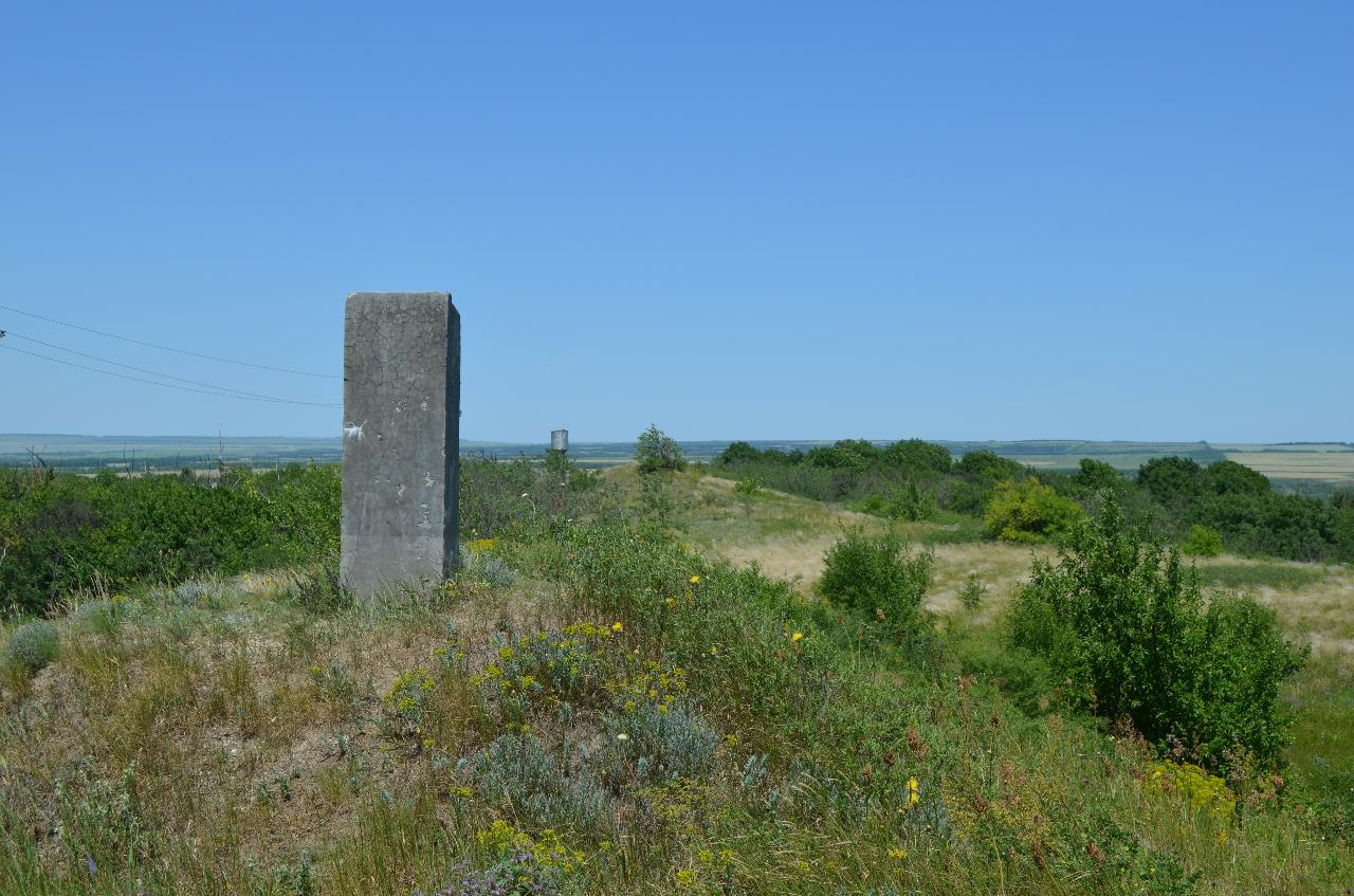 Гора Кокуртлы неподалёку от города Минеральные Воды. Вершина горы